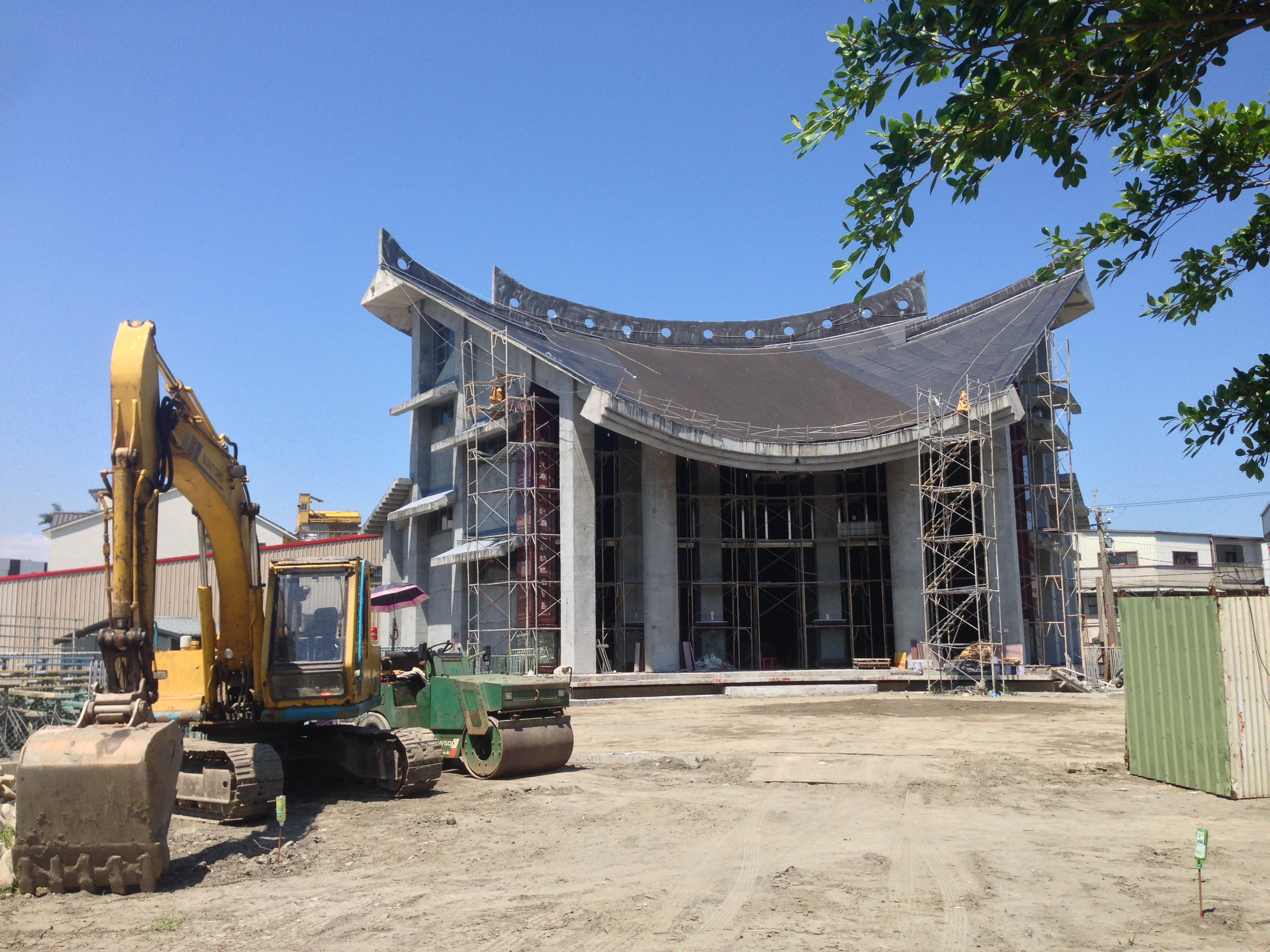 二結王公廟建造中的新廟與住友挖土機。